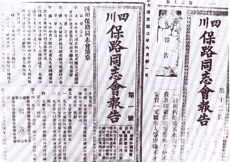 中文（中国大陆）: 四川保路同志会报告，宣統三年（1911）六月